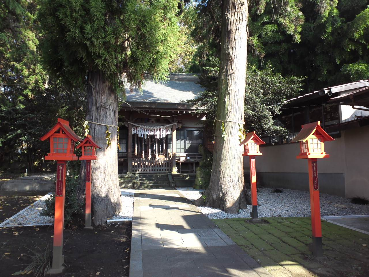 平出雷電神社